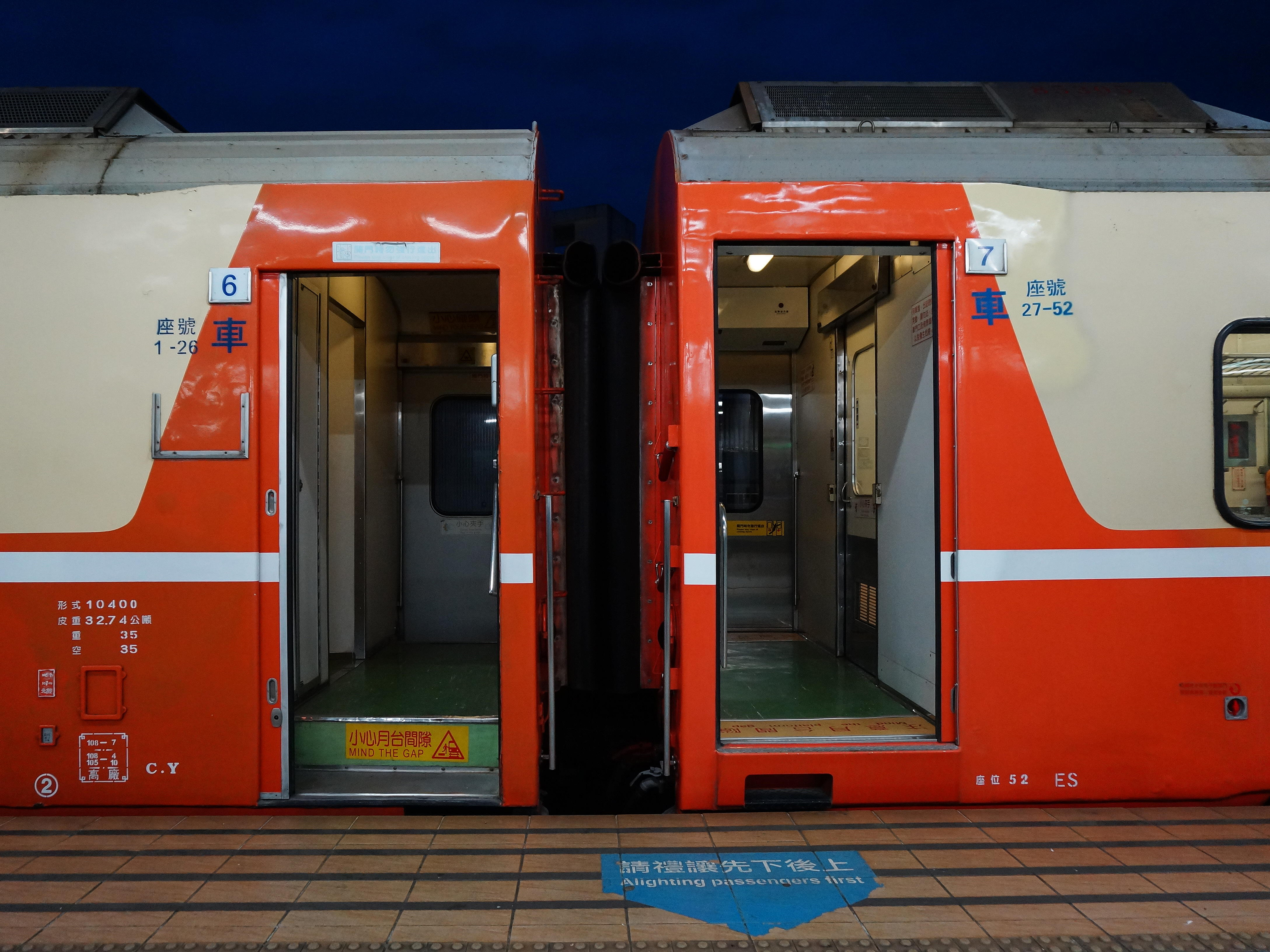 臺灣鐵路管理局汐止車站第二月台B側，FPK10400型莒光號客車自動門開門，注意自動門高低差。